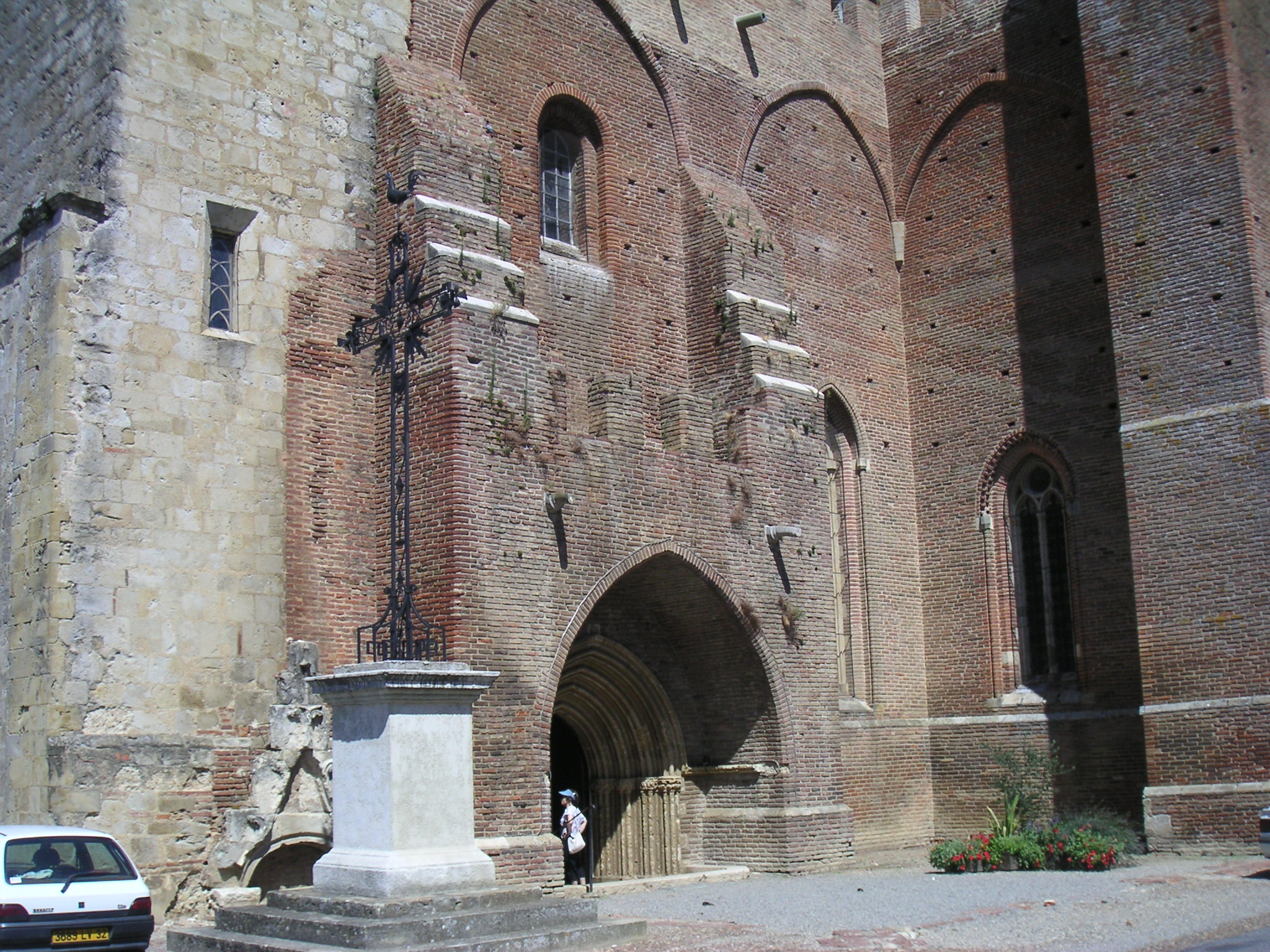 Photographie de l'entrée de l'église du village de Simorre (Gers, France)